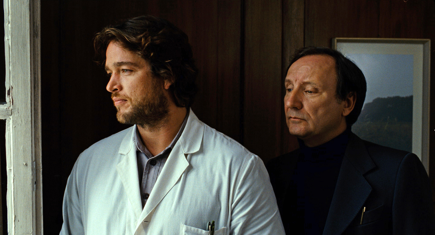 Ronald Zehrfeld und Rainer Bock in Barbara, 2012